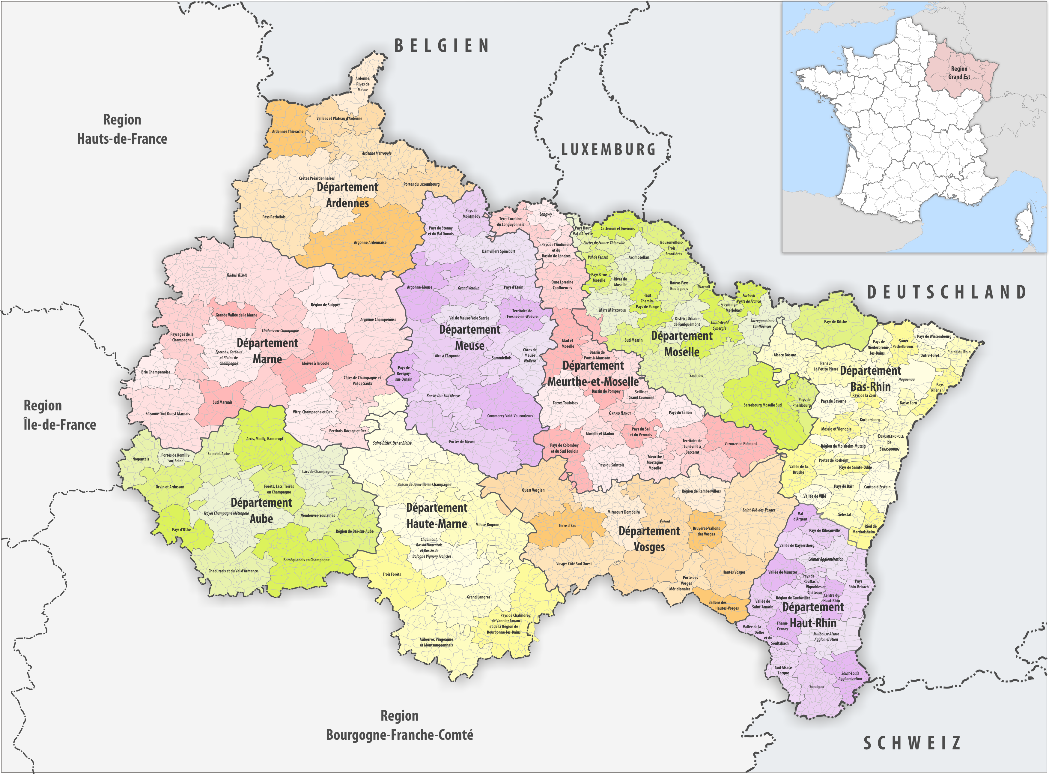 Gemeinden, Gemeindeverbände und Départemente in der Region Grand Est